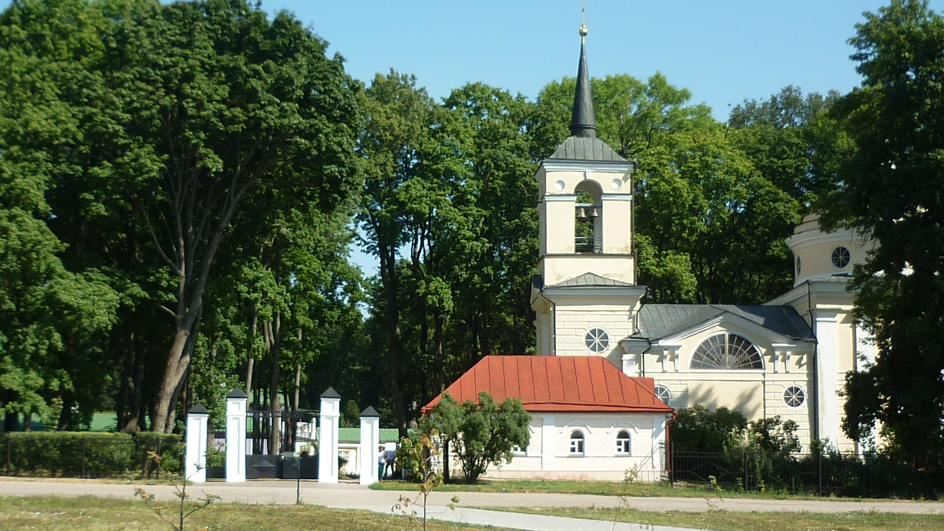 Парк-усадьба И.С. Тургенева 'Спасское-Лутовиново': Спасское-Лутовиново,Мценский район, Орловская область This image is related to the protected area of Russia number 5710081